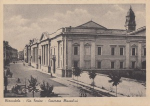 Caserma Mussolini negli anni 1930